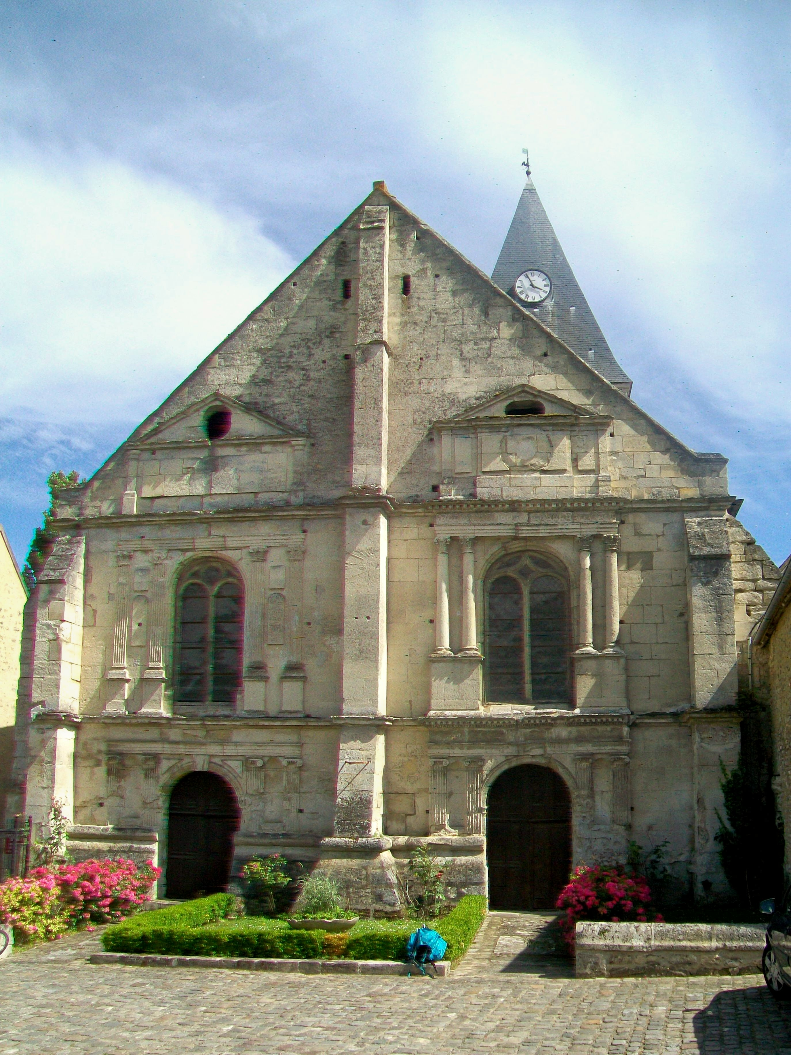 La façade occidentale de l'église à double nef ; c'est la seule façade à donner sur la voie publique (nord-ouest).